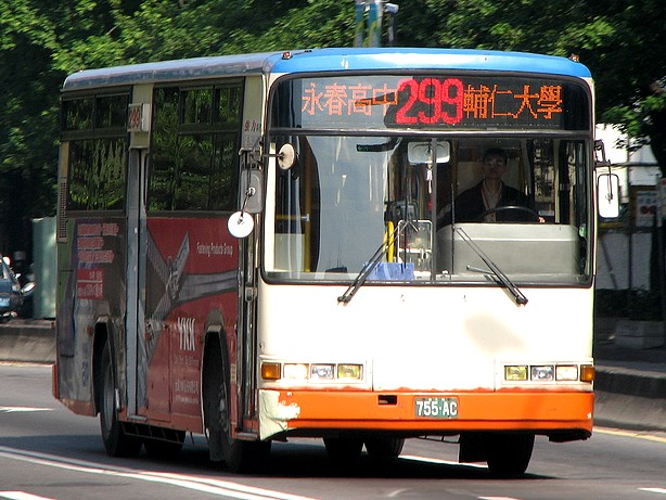 大都會客運 299 755-AC